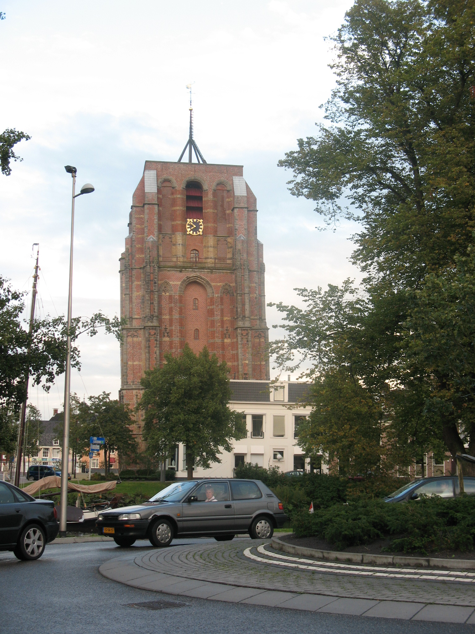 Leeuwarden, Oldehove